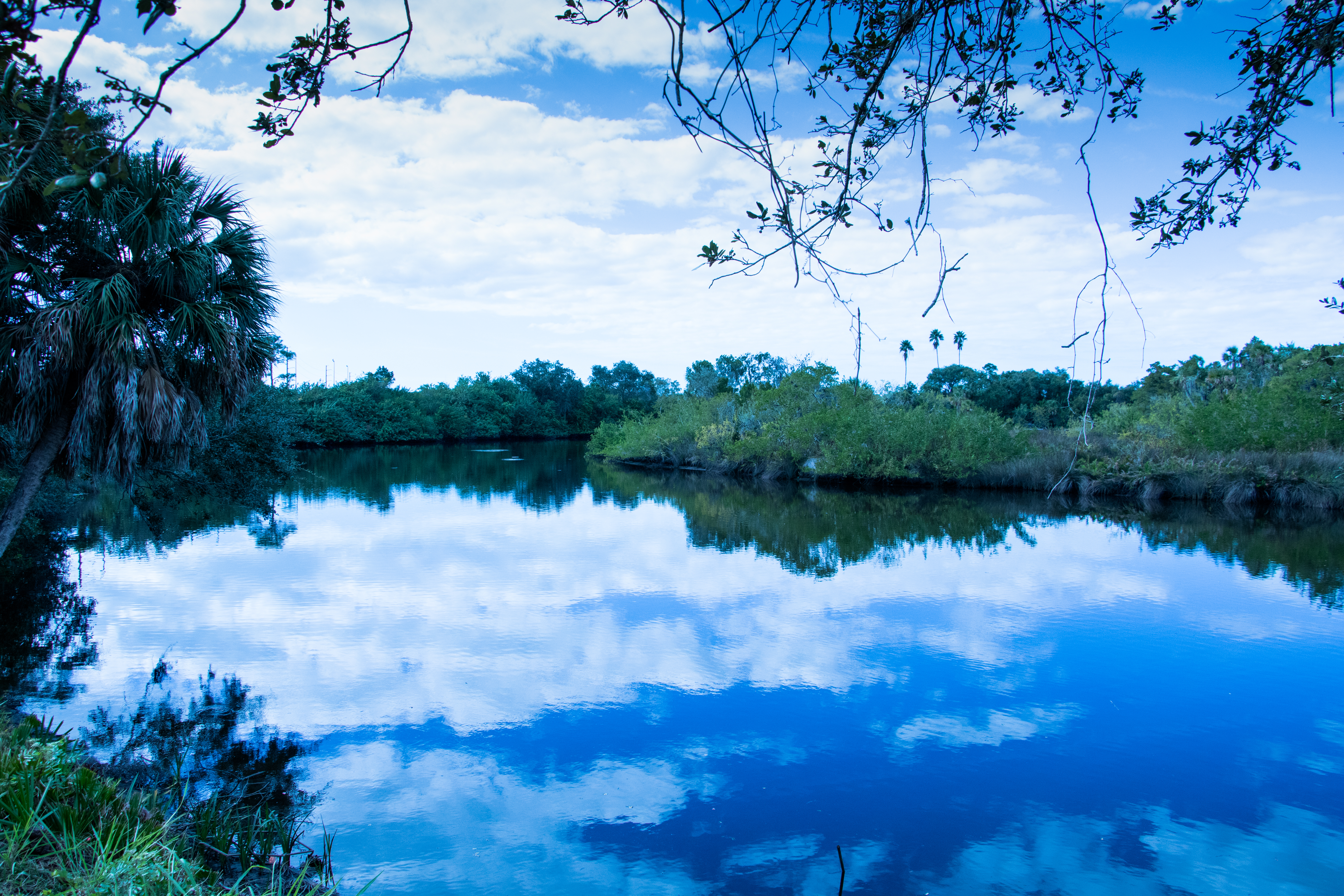 Braden River, Bradenton, Florida